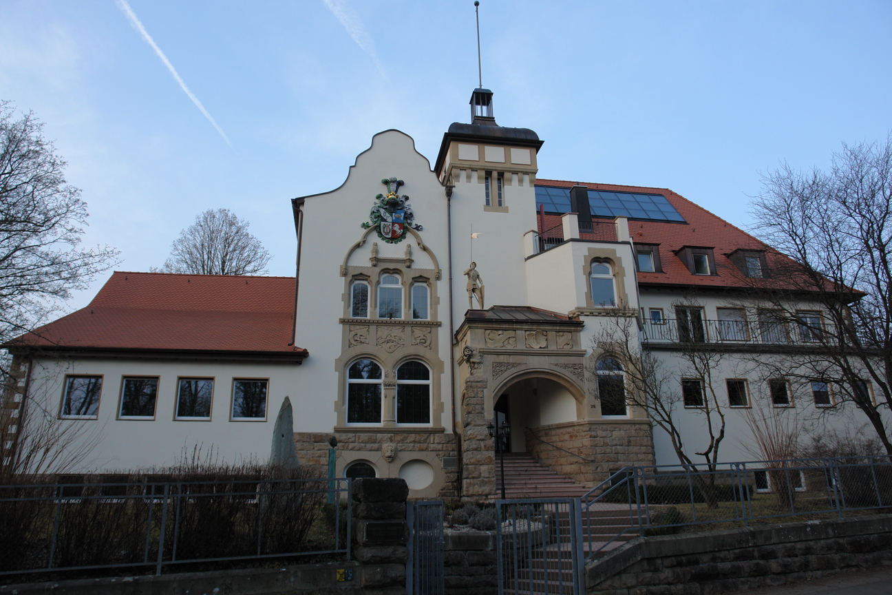 Verbindungshaus der Guestfalia in Tübingen